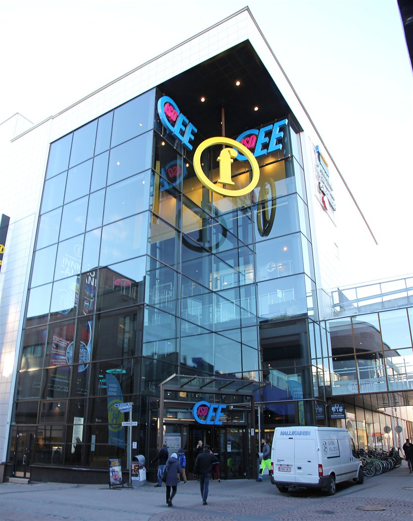 IsoCee on kauppa- ja viihdekeskus Kuopion torin läheisyydessä. Keskuksessa on muun muassa Finnkinon Scala-elokuvateatteri, kuntosali, Ravintola Os ja keilahalli. IsoCee avattiin perjantaina 17.5.2013. Kauppakeskuksen katuosoite on Ajurinkatu 16, ja rakennus on kauppatoria ympäröivässä Multimäen kaupunginosassa. Nimen IsoCee C viitannee kuopiolaiseen tavaratalo Carlsoniin, jonka pysäköintilaitoksista yksi sijaitsee IsoCeen Savonkadun puoleisella sivulla.